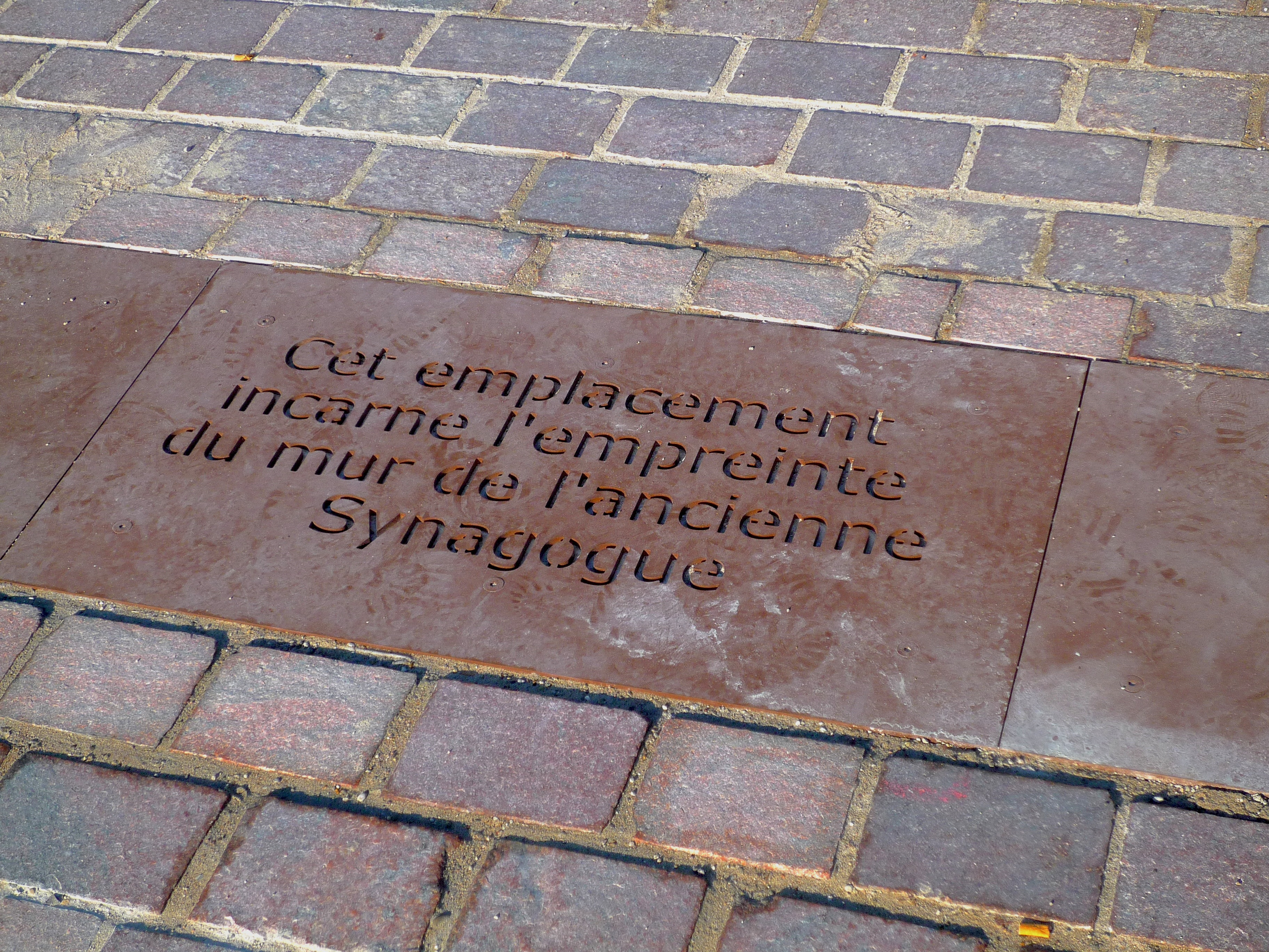 Strasbourg monument allée des Justes